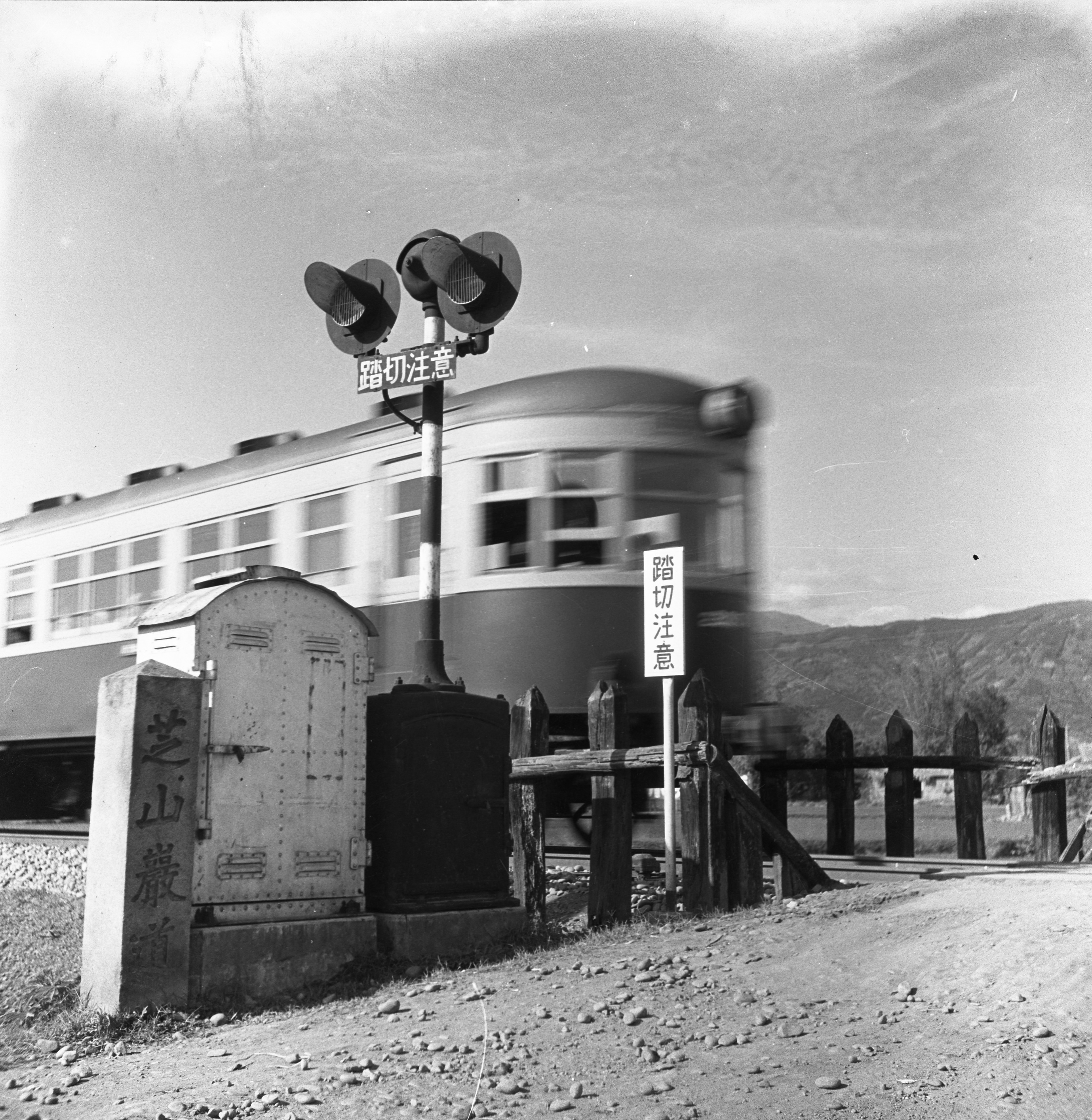 中文（台灣）: 淡水線汽油客車，於芝山岩道平交道